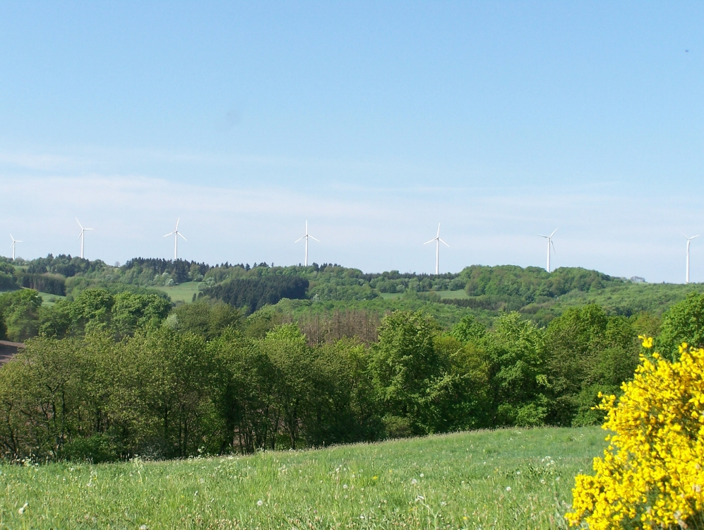 Landschaft bei Eckerseiler mit Windkraftanlagen